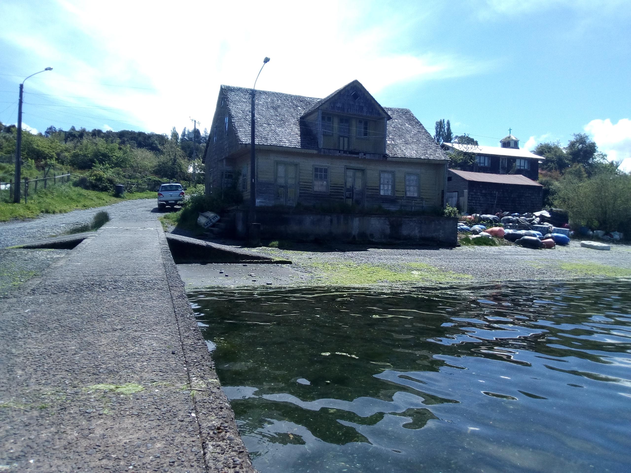 Fotografía tomada desde el embarcadero en Puerto Quíquel, comuna de Dalcahue, Chile.